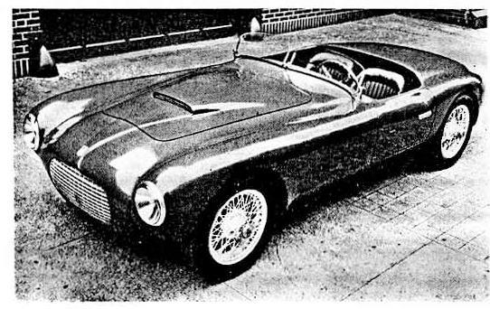 bandini 1100 sport